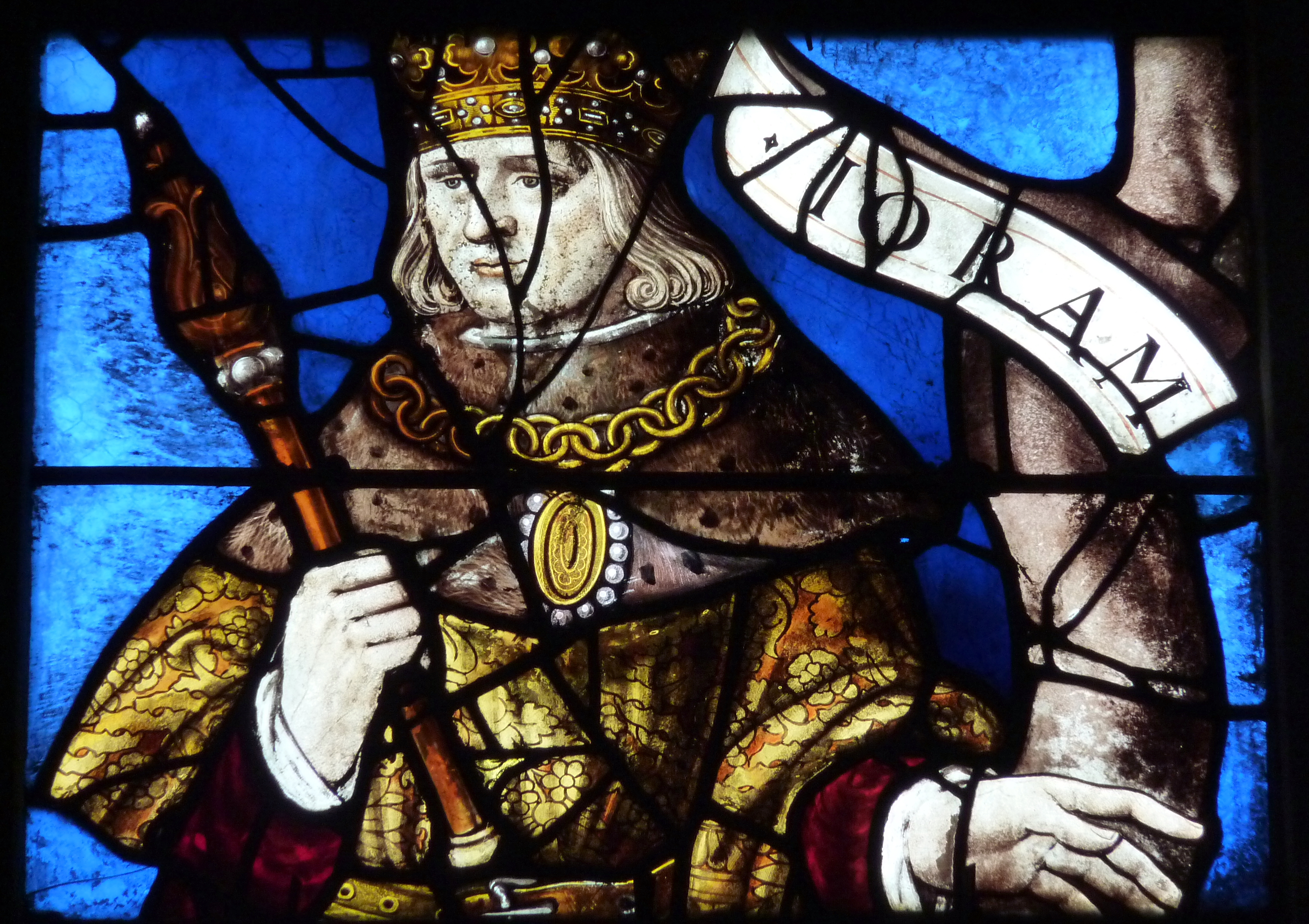 Bleiglasfenster in der katholischen Pfarrkirche Saint-Martin in Groslay, Darstellung: Wurzel Jesse mit Ausschnitt: Joram